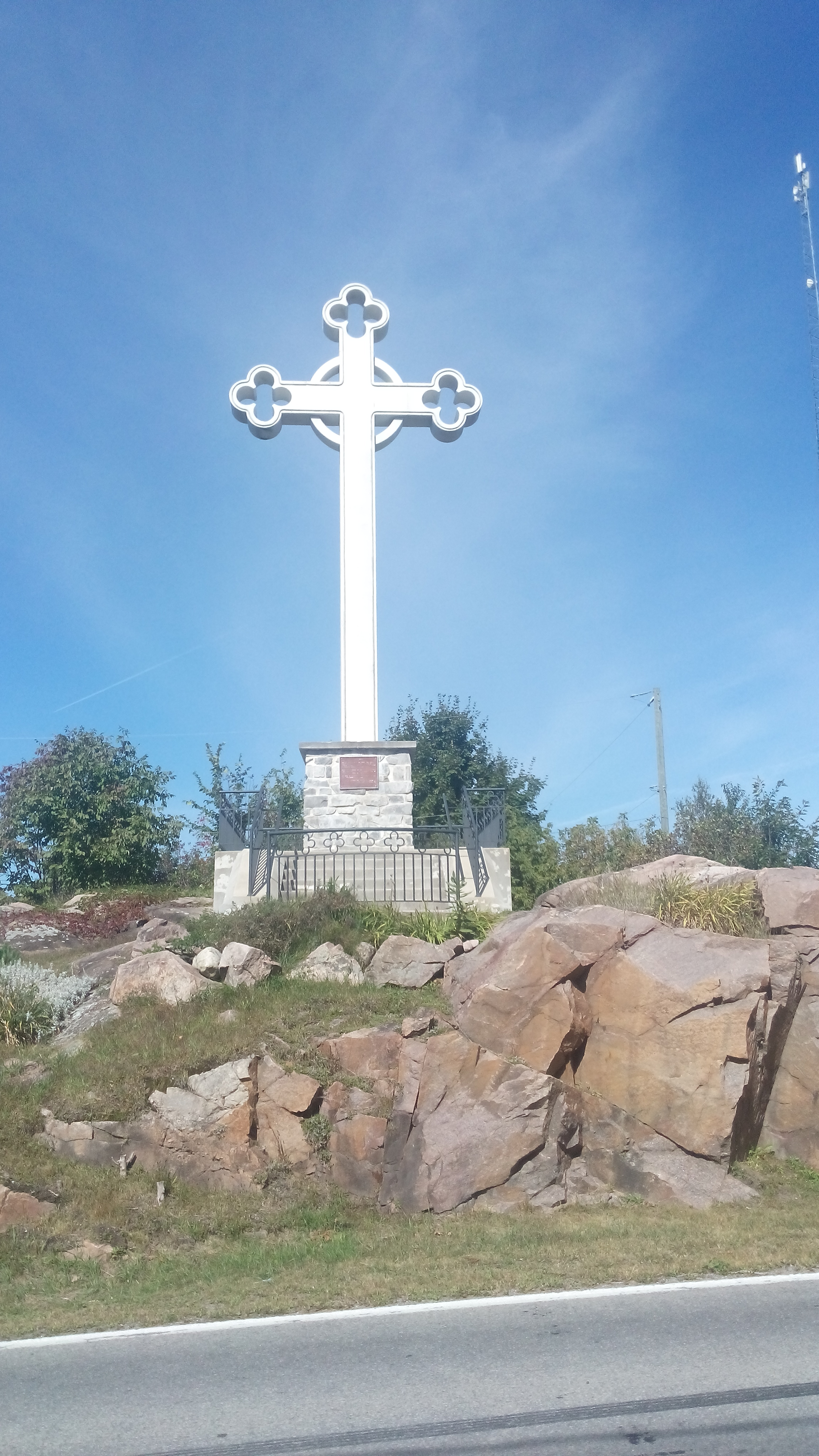 Croix de chemin Sainte-Marthe